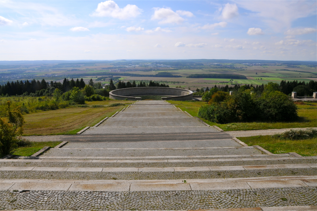 Ongeveer vijf kilometer buiten de bebouwde kom van Weimar bevindt zich aan de zuidkant van de Ettersberg het Mahnmal Memorial met de beeldengroep van Fritz Cremer die het verzet in Buchenwald uitbeeldt. Vanaf de beeldengroep gezien.